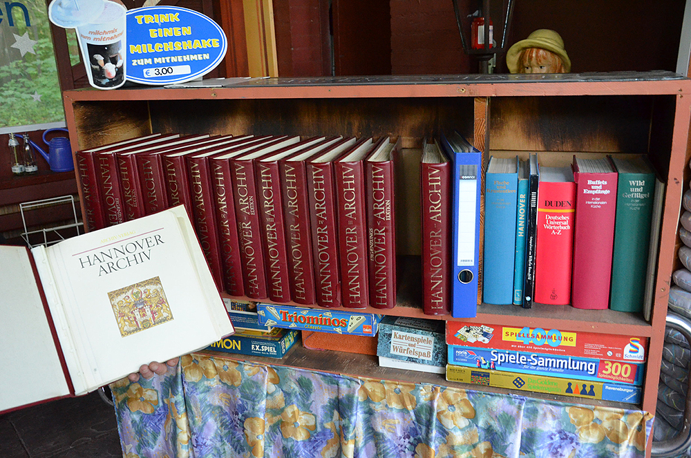 Neben Spielen und Büchern hält das Milchhäuschen in der Eilenriede für Besucher beispielsweise Franz Rudolf Zankls Hannover Archivs vor, eine Sammlung kommentierter Faksimilés aus der Geschichte der Stadt Hannover ...